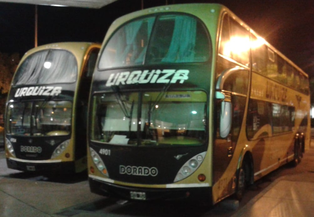 Par de omnibus de General Urquiza (servicio Dorado), en la terminal Mariano Moreno de Rosario.